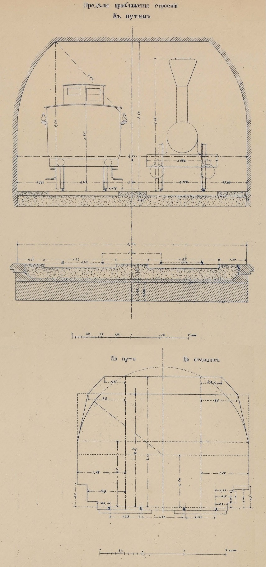 Габариты приближения строений российских железных дорог